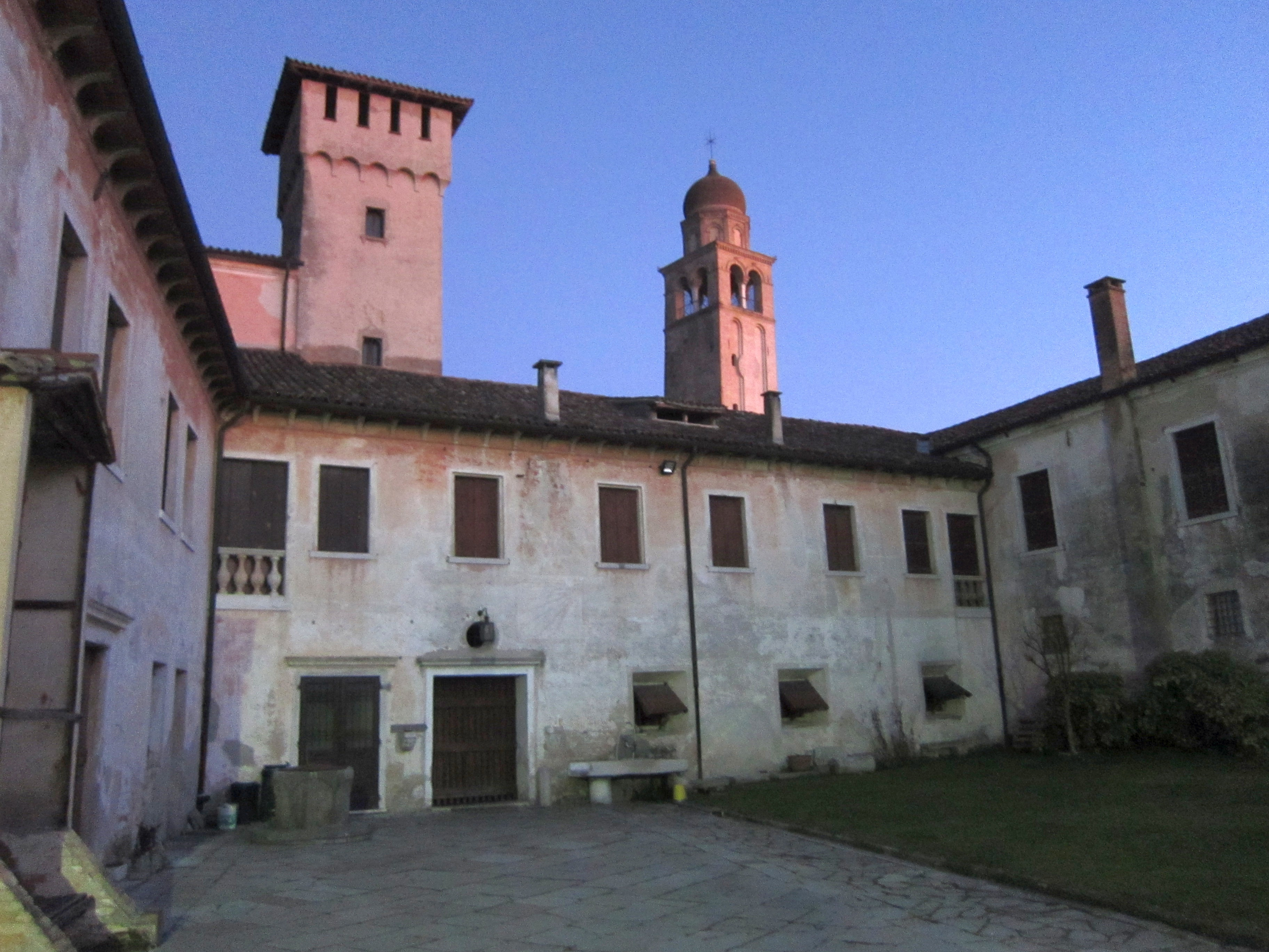 Abbazia Santa Maria del Pero, Monastier di Treviso, TV, Italien